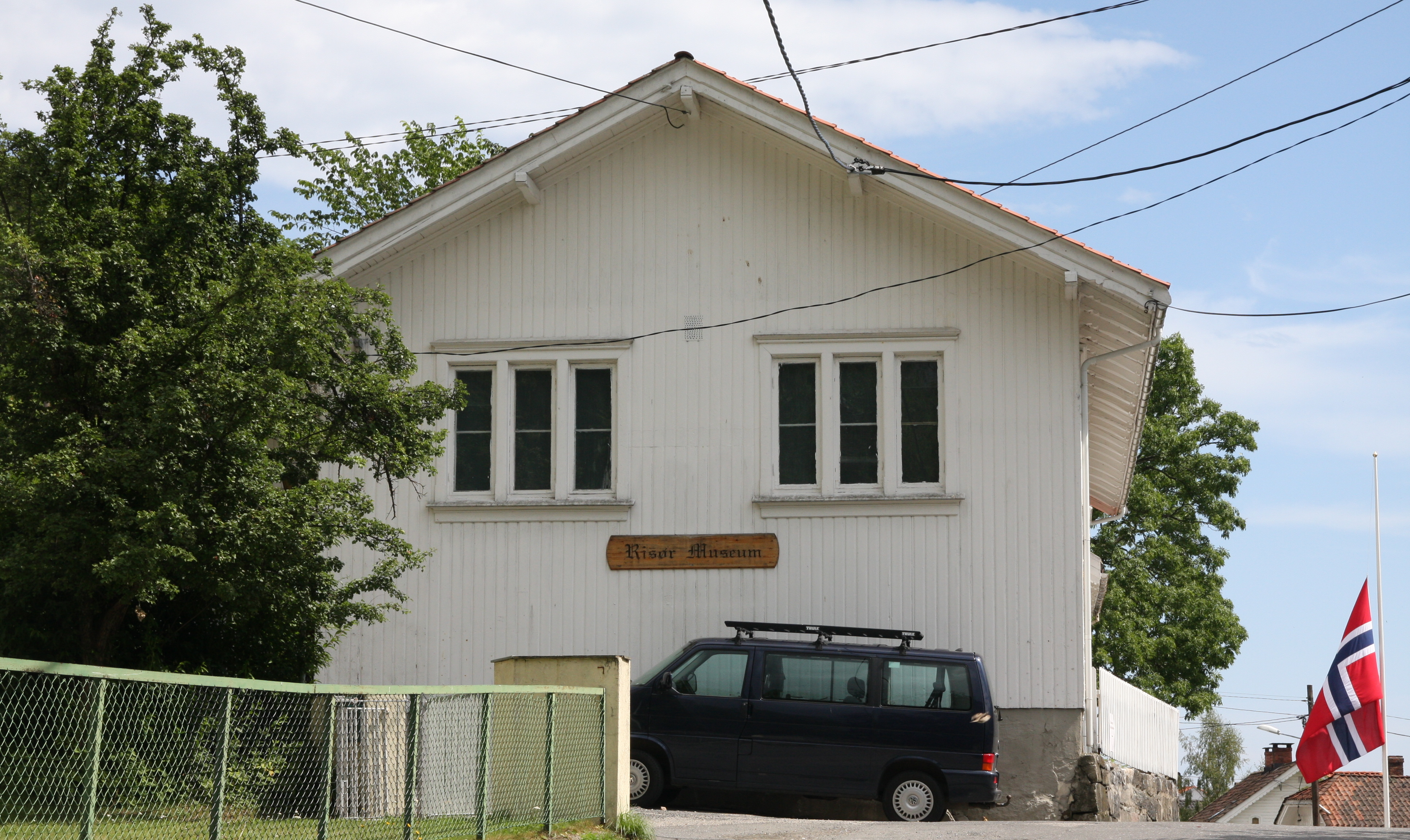 Risør museum